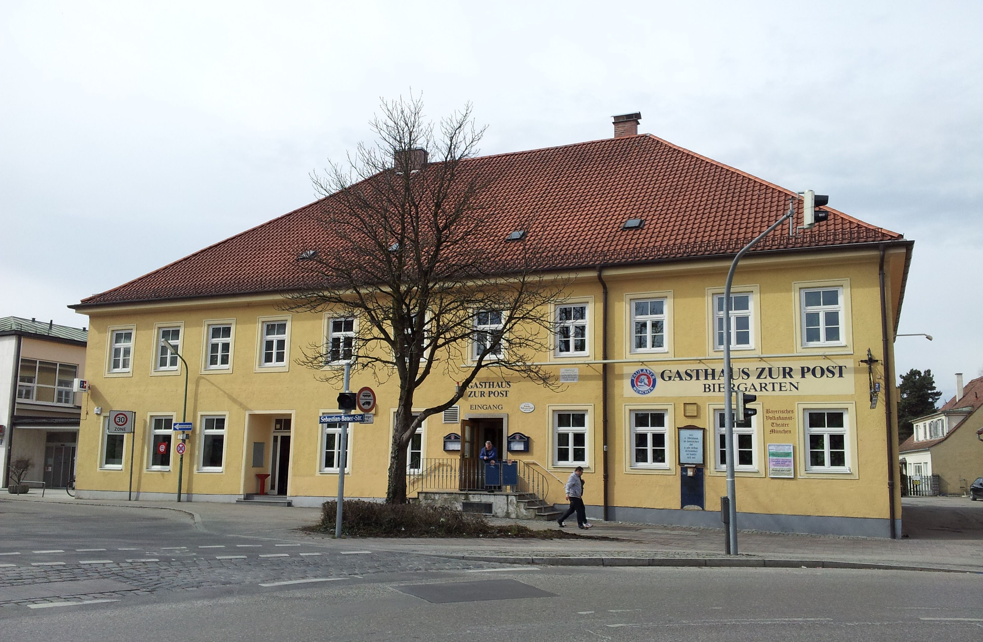 Gasthof zur Post in München-Perlach, Pfanzeltplatz 12